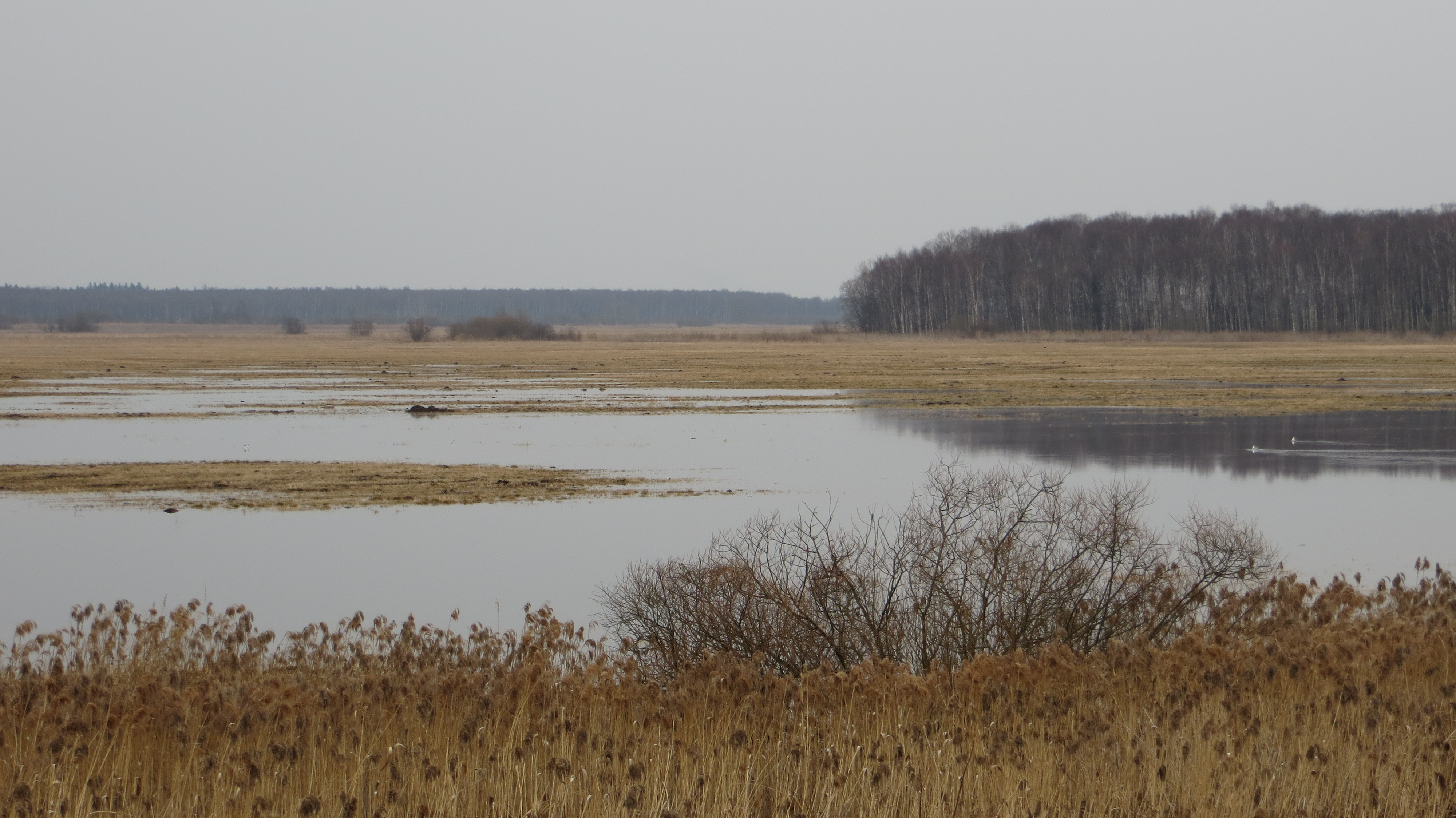 Журавлиная родина: Талдомский район, Московская область This image is related to the protected area of Russia number 5010288